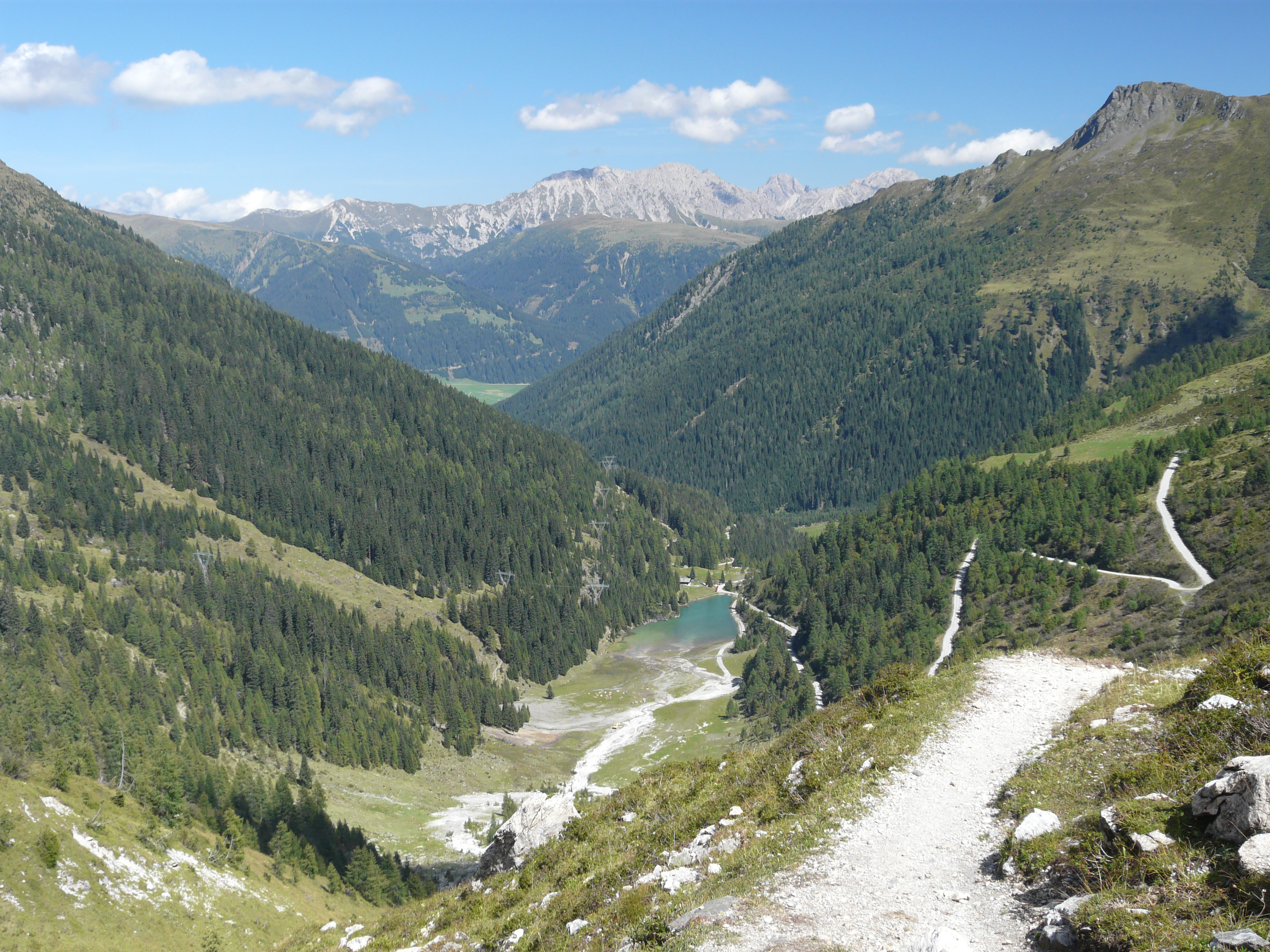 Der Talschluss des Dorfertals in den Karnischen Alpen. Rechts der Spitzköfele (2314m). Blick nach NNO auf die Lienzer Dolomiten.